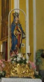 la statua lignea della madonna addolorata ad ascona(liguria)